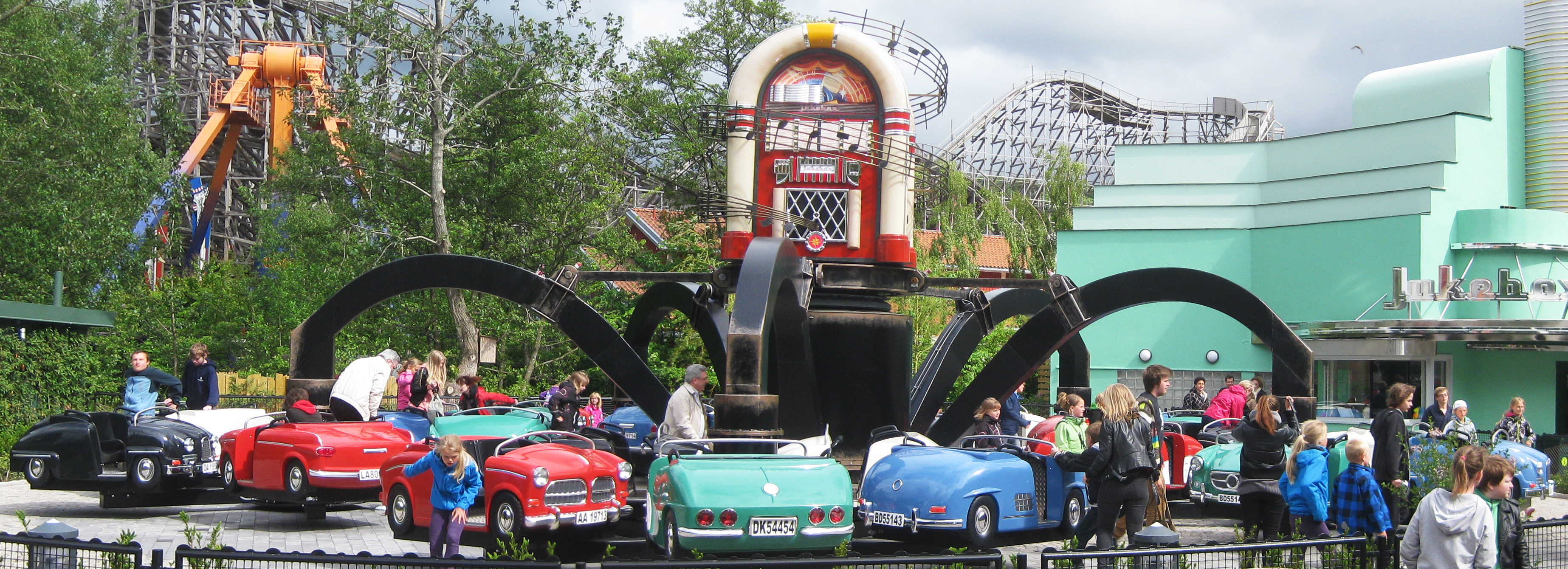 Åkattraktionen Jukebox på Liseberg i juni 2012. Denna version är något beskuren.